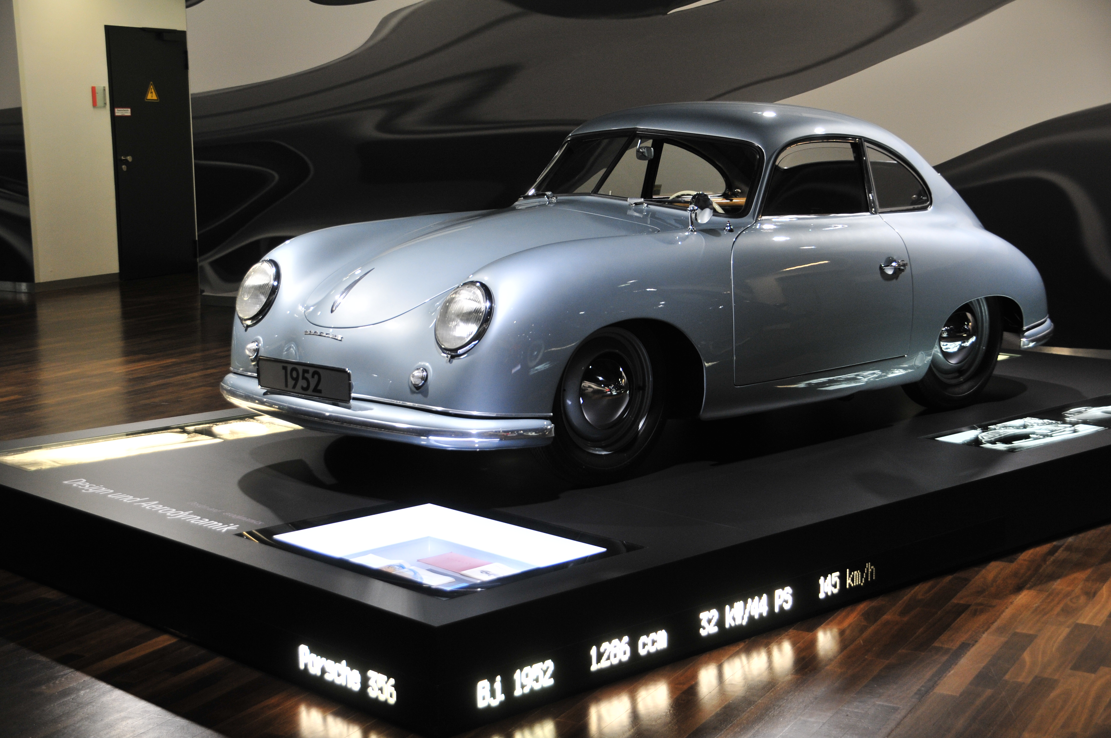 Porsche 356 in der Autostadt Wolfsburg